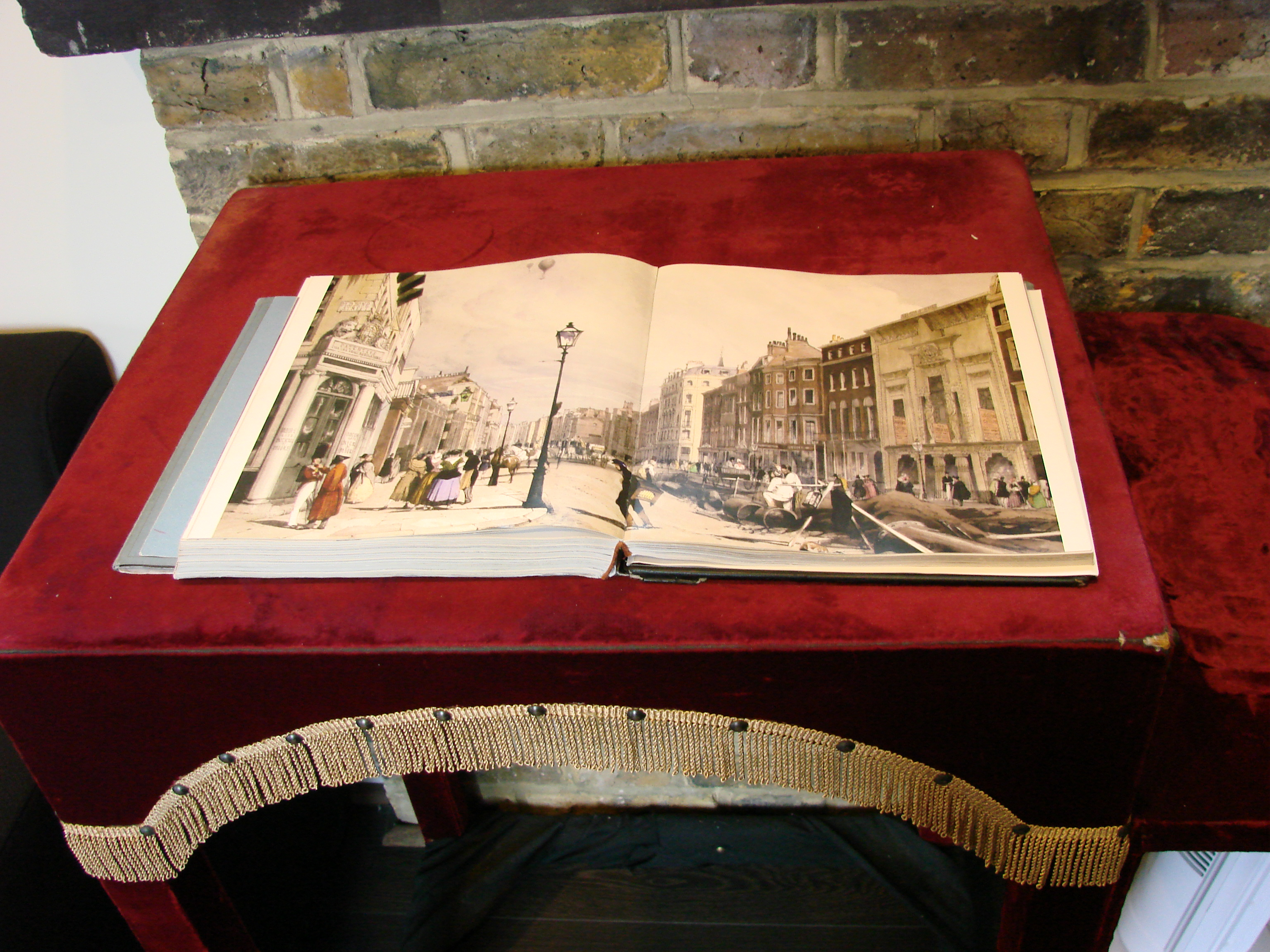 Una delle scrivanie utilizzate da Charles Dickens durante le sue letture pubbliche, conservata al Dickens Museum di Londra.